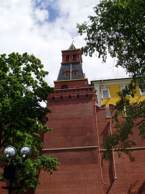 Tour du Commandant (Kremlin de Moscou)